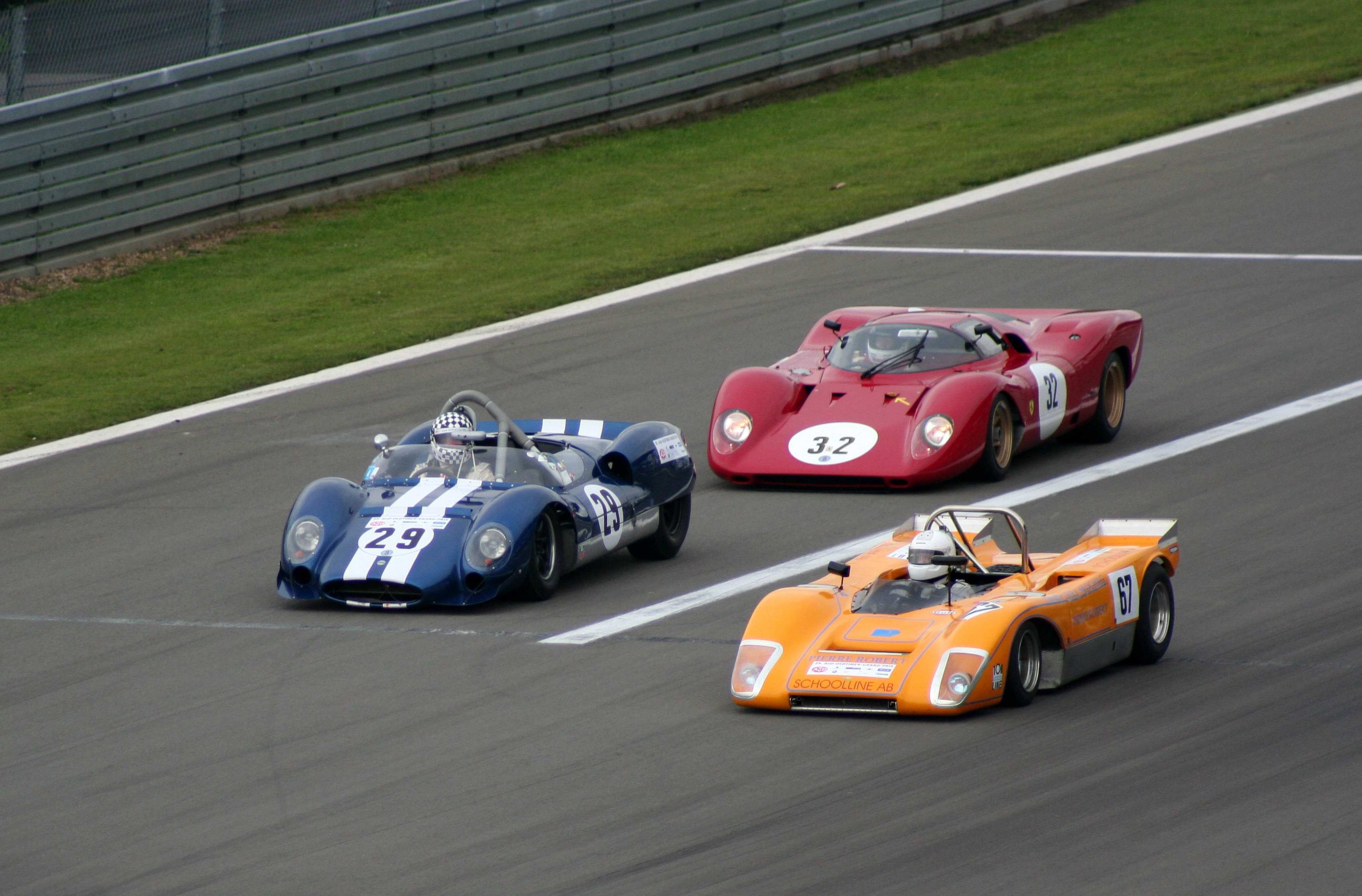 AvD-Oldtimer-Grand-Prix - World Sportscar Masters 2011. Nr. 67 Lola T 210, Baujahr 1970, Nr. 29 Cooper Monaco, Baujahr 1963, Nr. 32 Ferrari 312 P, Baujahr 1969